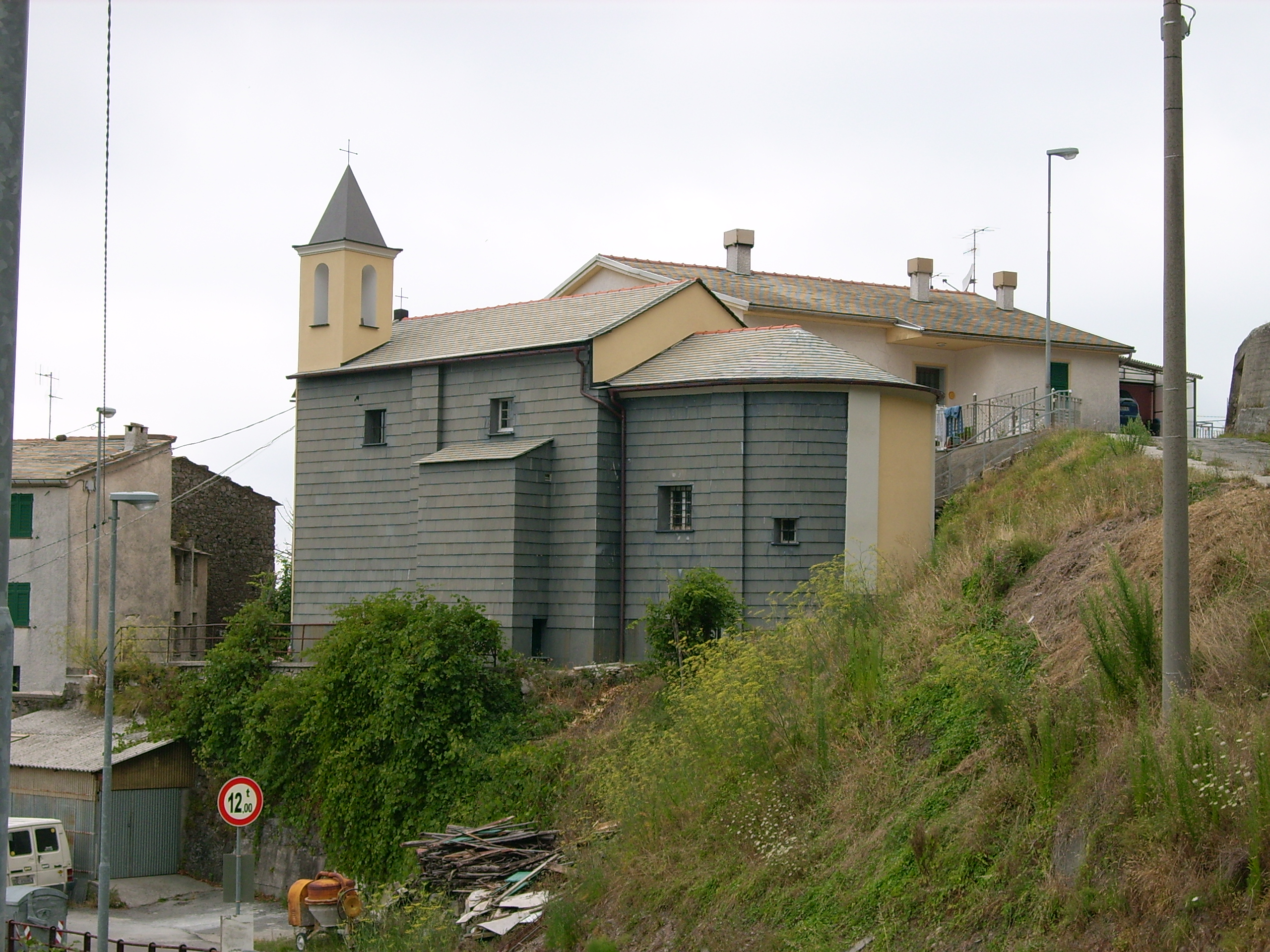 Chiesa di Sant'Antonio Abate presso Croce d'Orero, Orero, Liguria, Italia